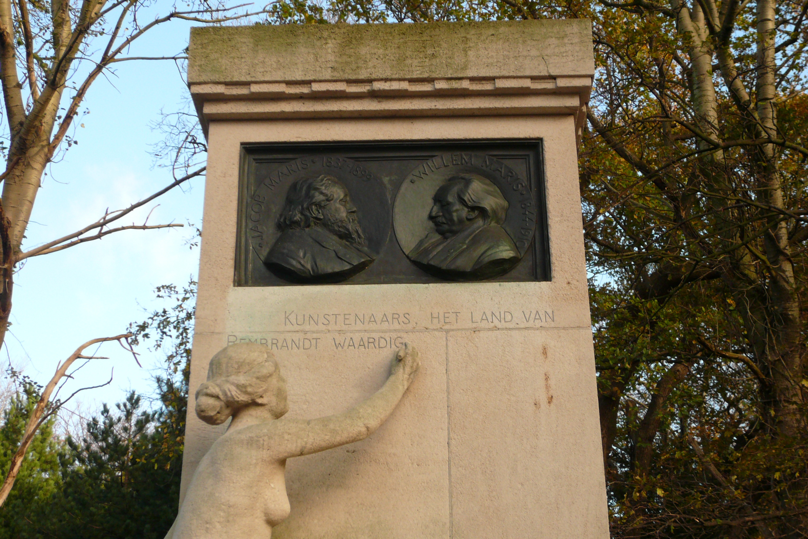 Monument Jacob en Willem Maris, detail